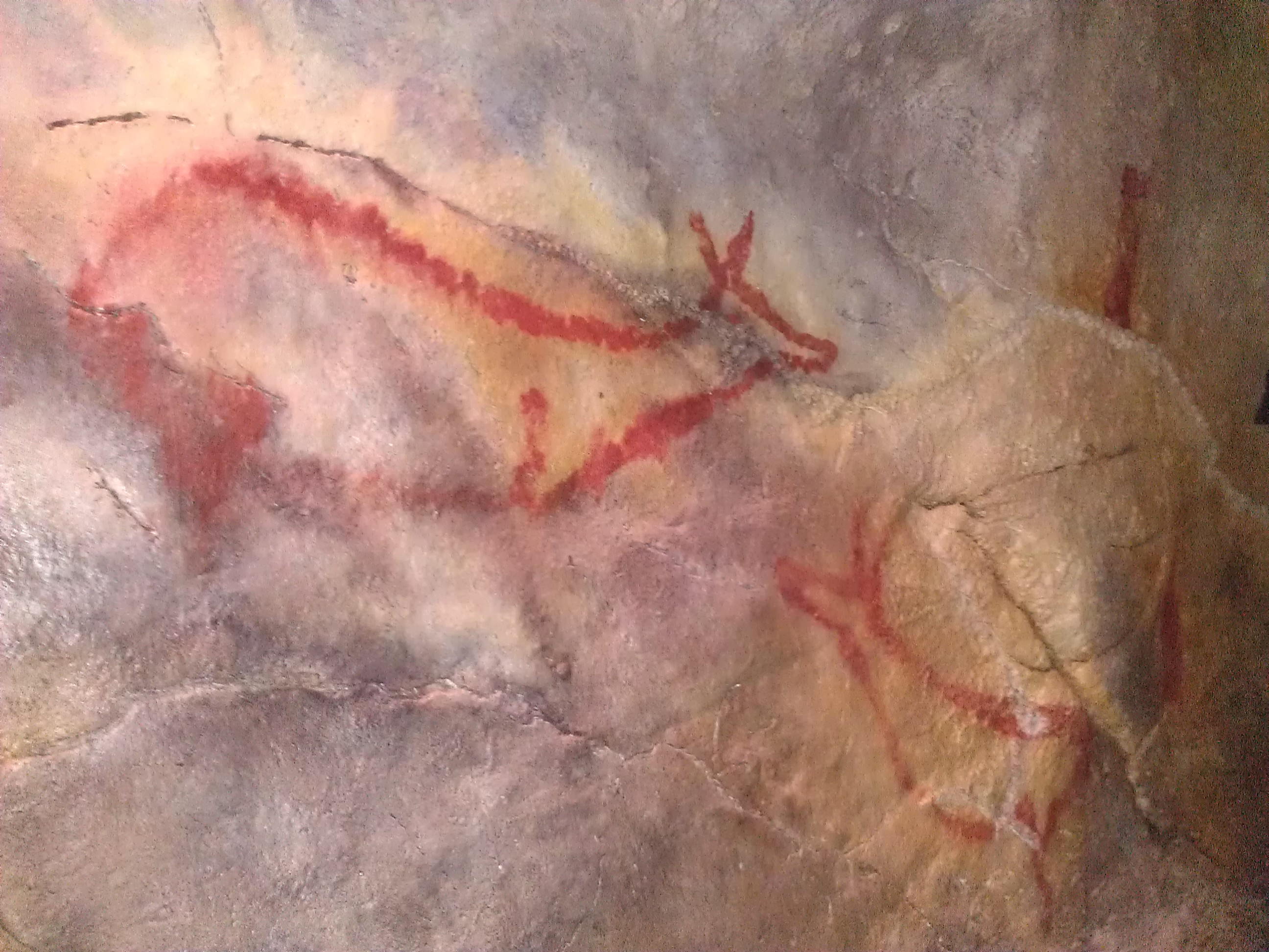 Parque de la Prehistoria de Teverga, Asturias (España). Réplica del panel de las ciervas de las cuevas Covalanas. Réplica por Matilde Múzquiz y Pedro Saura.